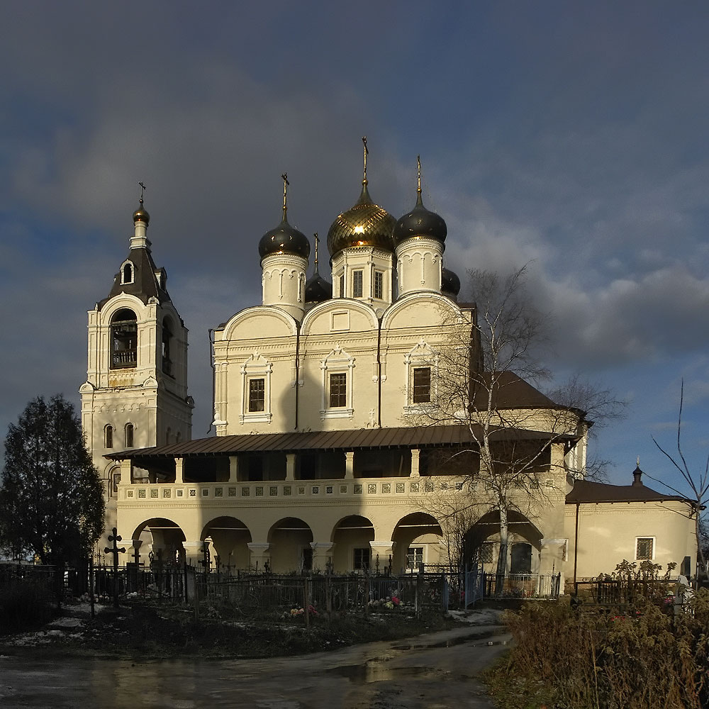 Годы строительства 1680-е, колокольня 1870 Возвращен верующим в 1993, отреставрирован. Подворье Соловецкого монастыря.